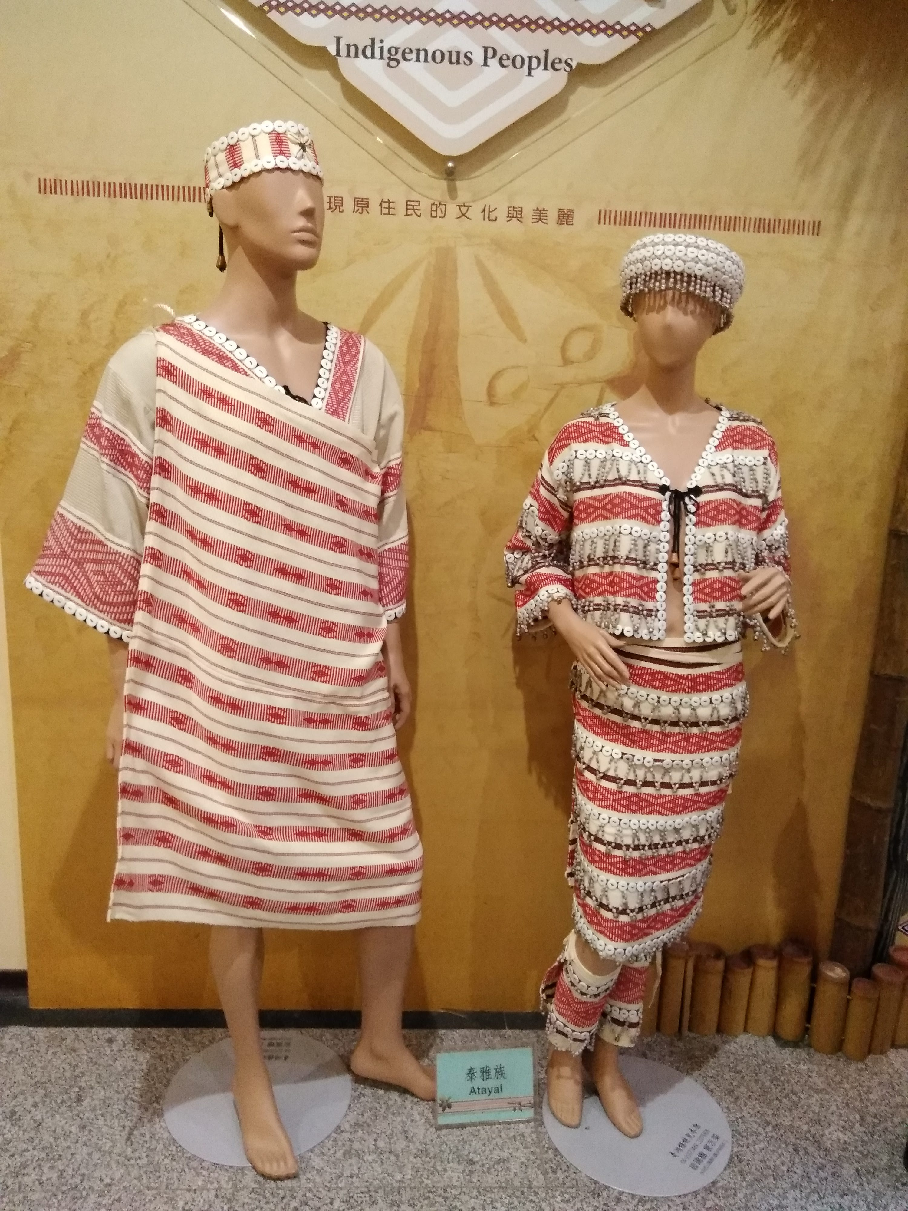 中文（台灣）: 台灣原住民服飾